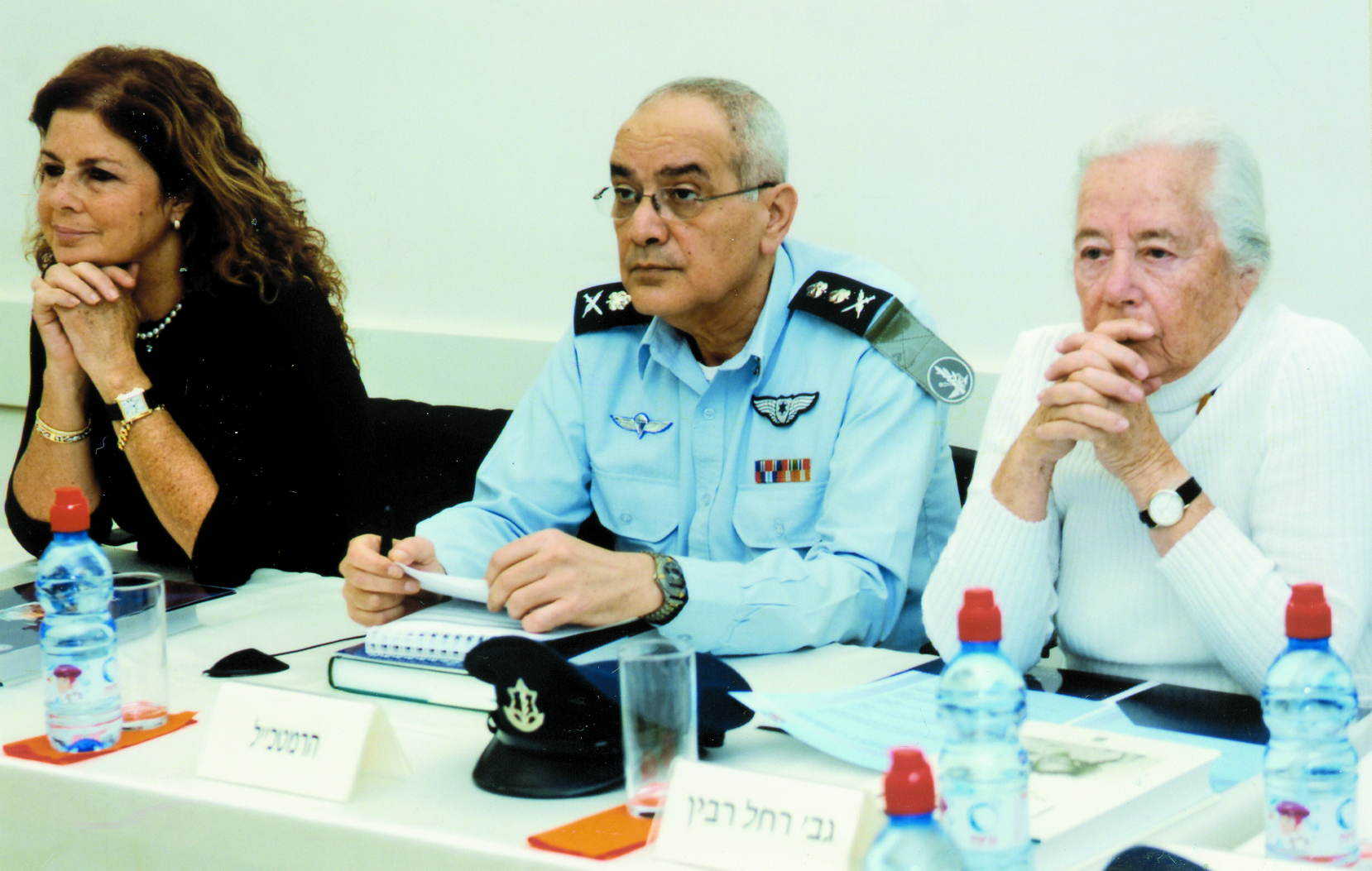 מימין: רחל (אחותו של יצחק), הרמטכ"ל דן חלוץ ודליה רבין